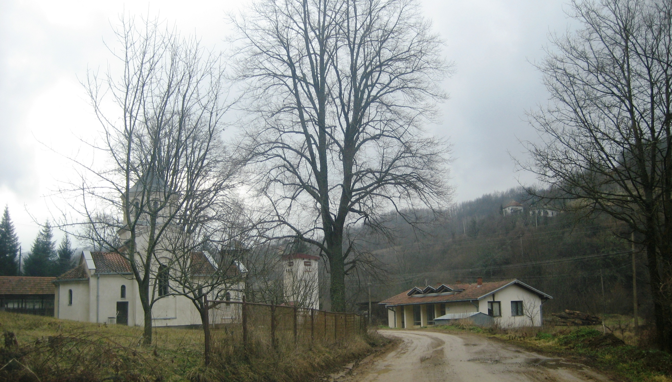 Добри До, Куршумлија